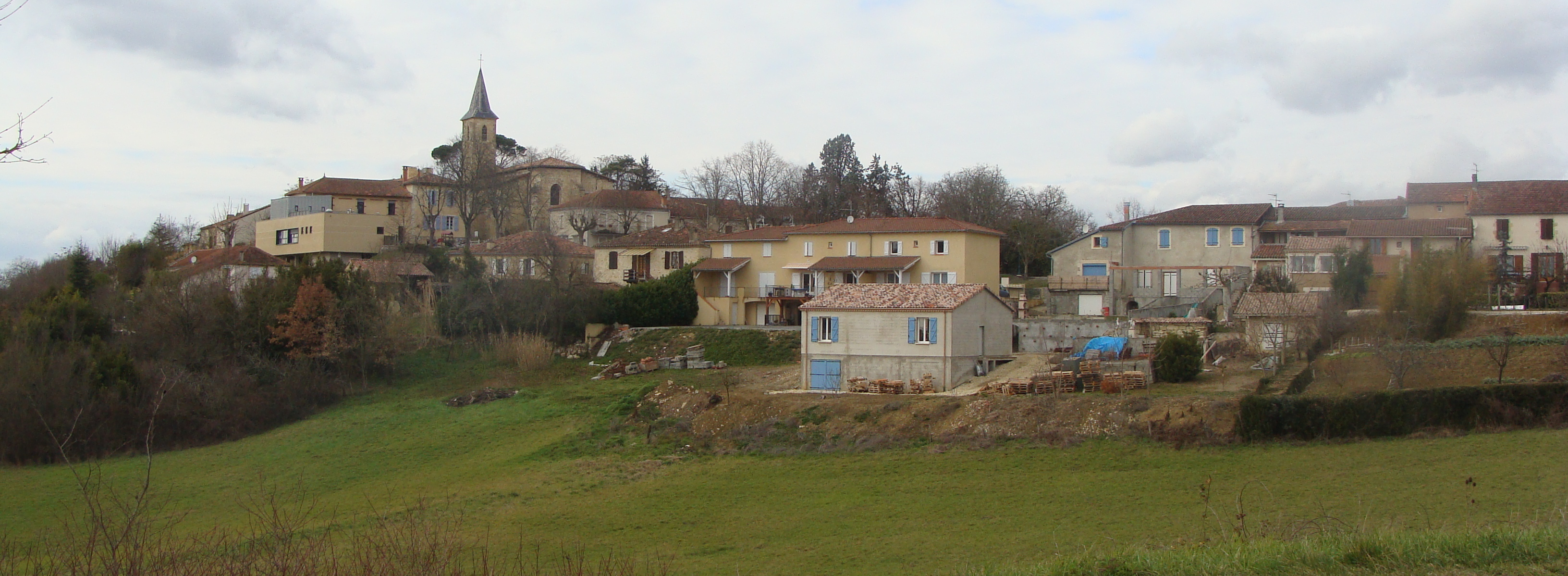 Roquelaure (Gers) vue du sud. Roquelaure (Gers) seen from the south.